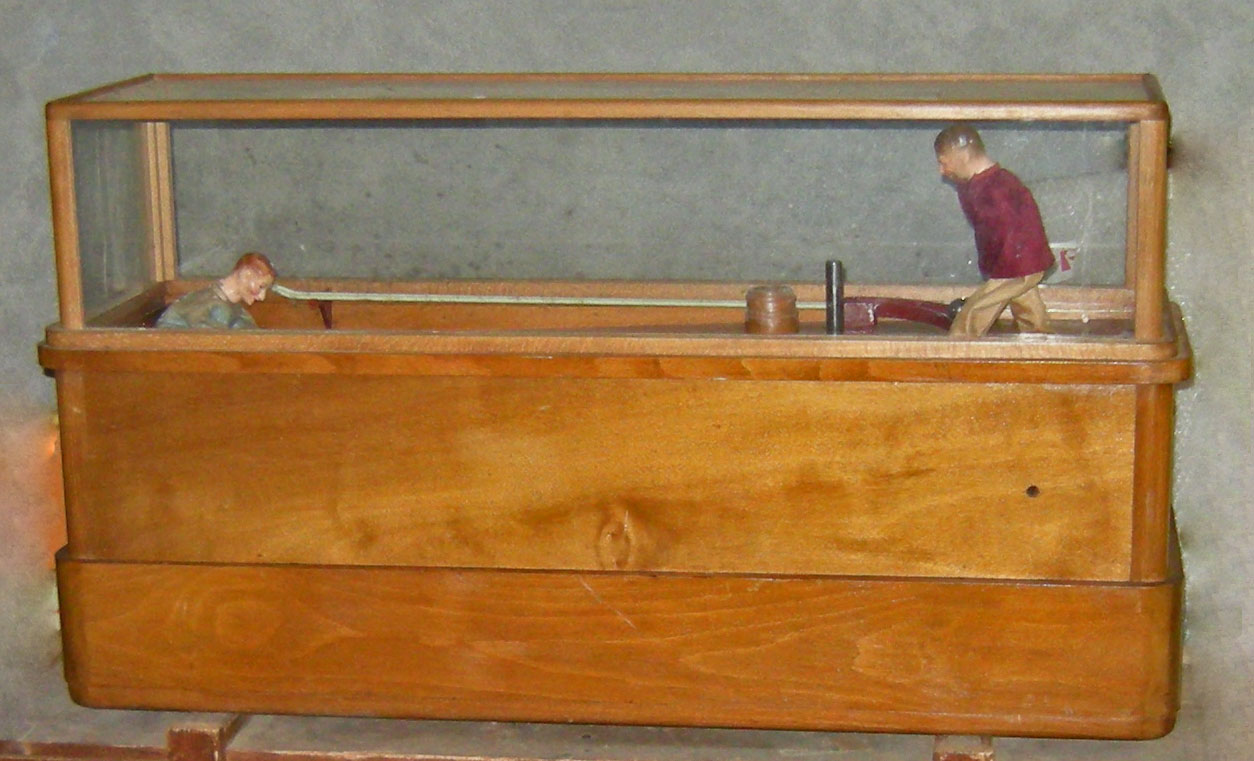 Motosacoche Kegelautomat Nr. 139